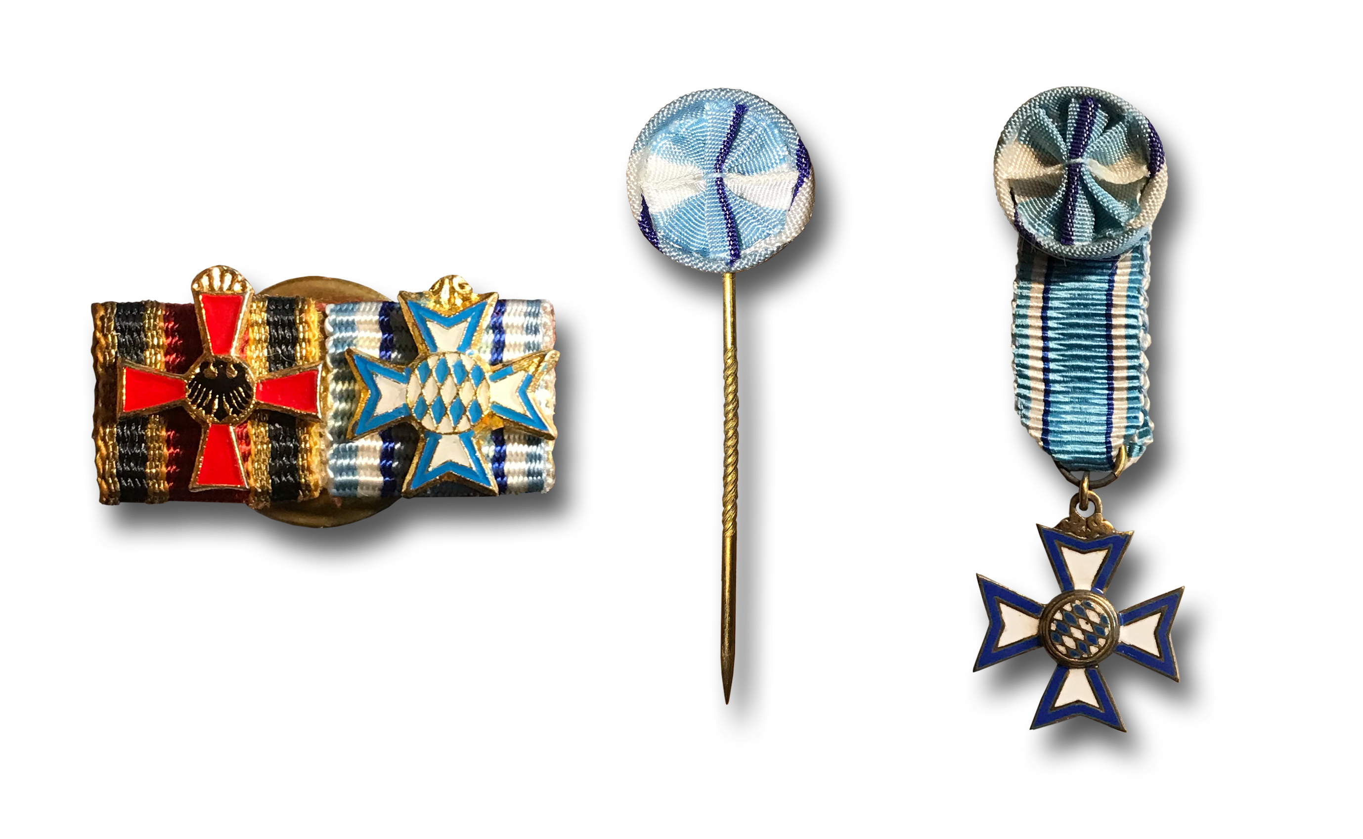 Bayerischer Verdienstorden Varianten